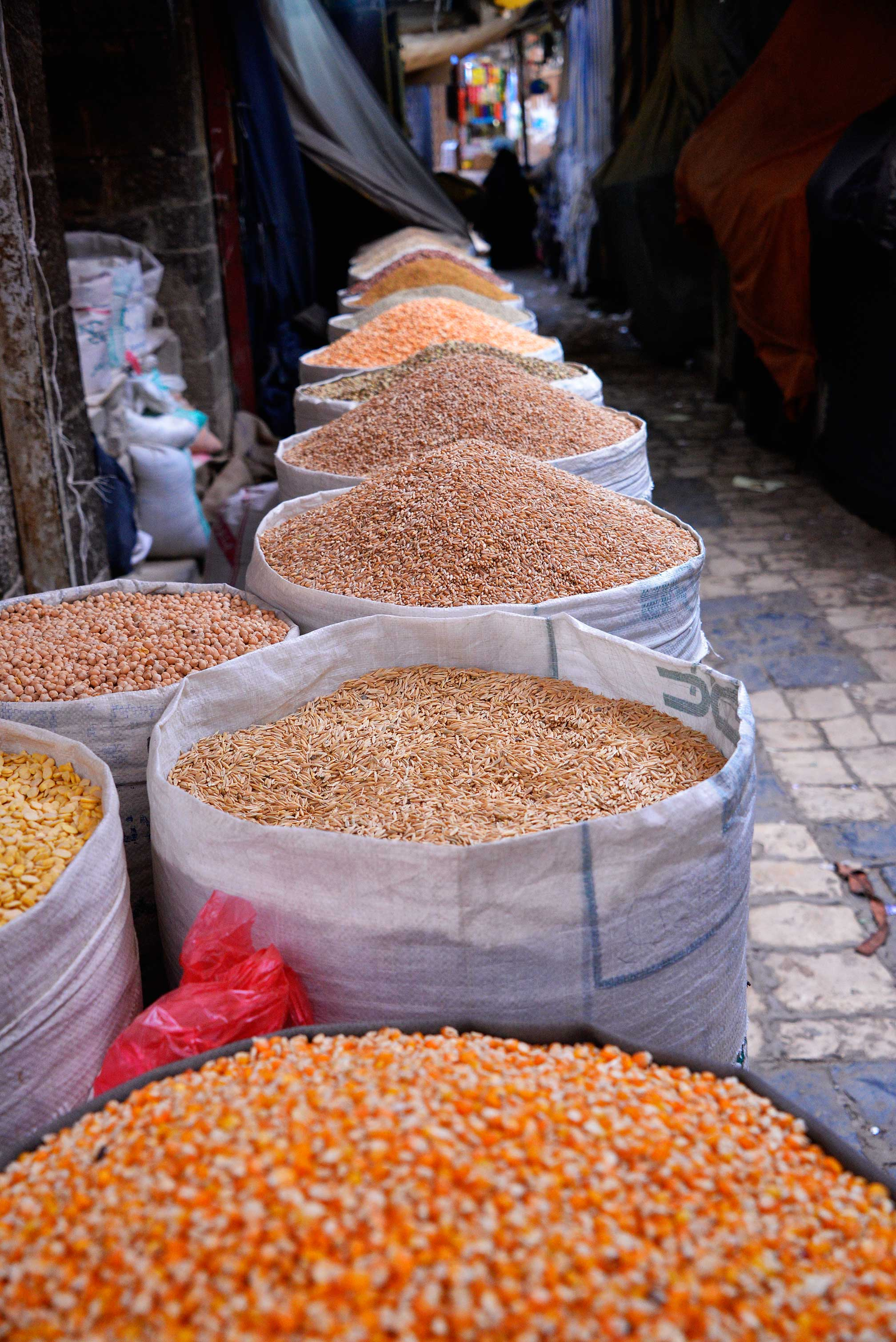 Market, Sanaá, Yemen